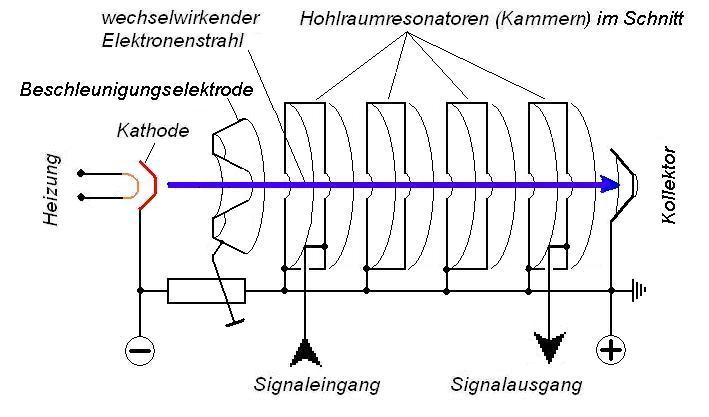 Schema Mehrkammerklystron